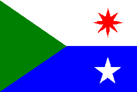 Bandera del municipio Arismendi, isla de Margarita, estado Nueva Esparta, Venezuela